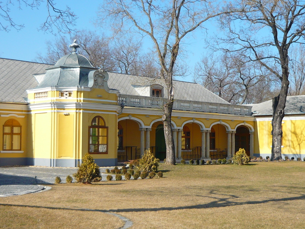 Podmaniczky–Vigyázó-kastély This is a photo of a monument in Hungary. Identifier: 1247